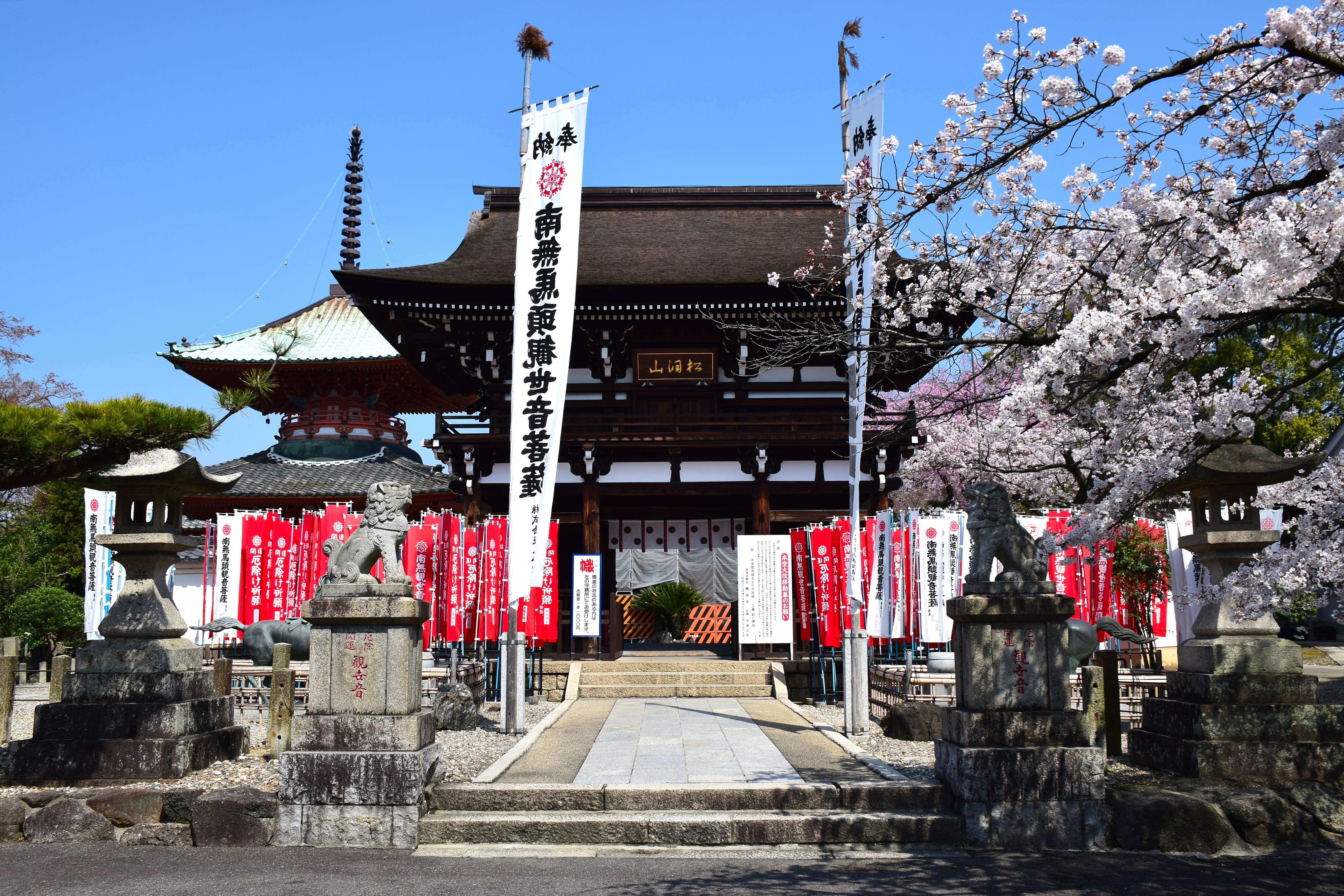 龍泉寺山門